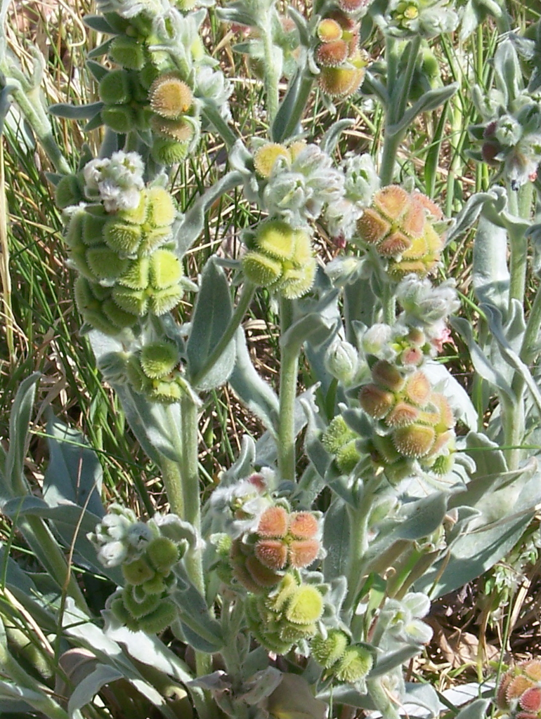 Pardoglossum cheirifolium (VIniebla) - Fructificaciones - Cabezo de los Ojales/de las Fuentes, Albatera (Alicante, España).